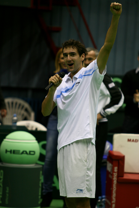 Davisov kup 2011. u Zagrebu